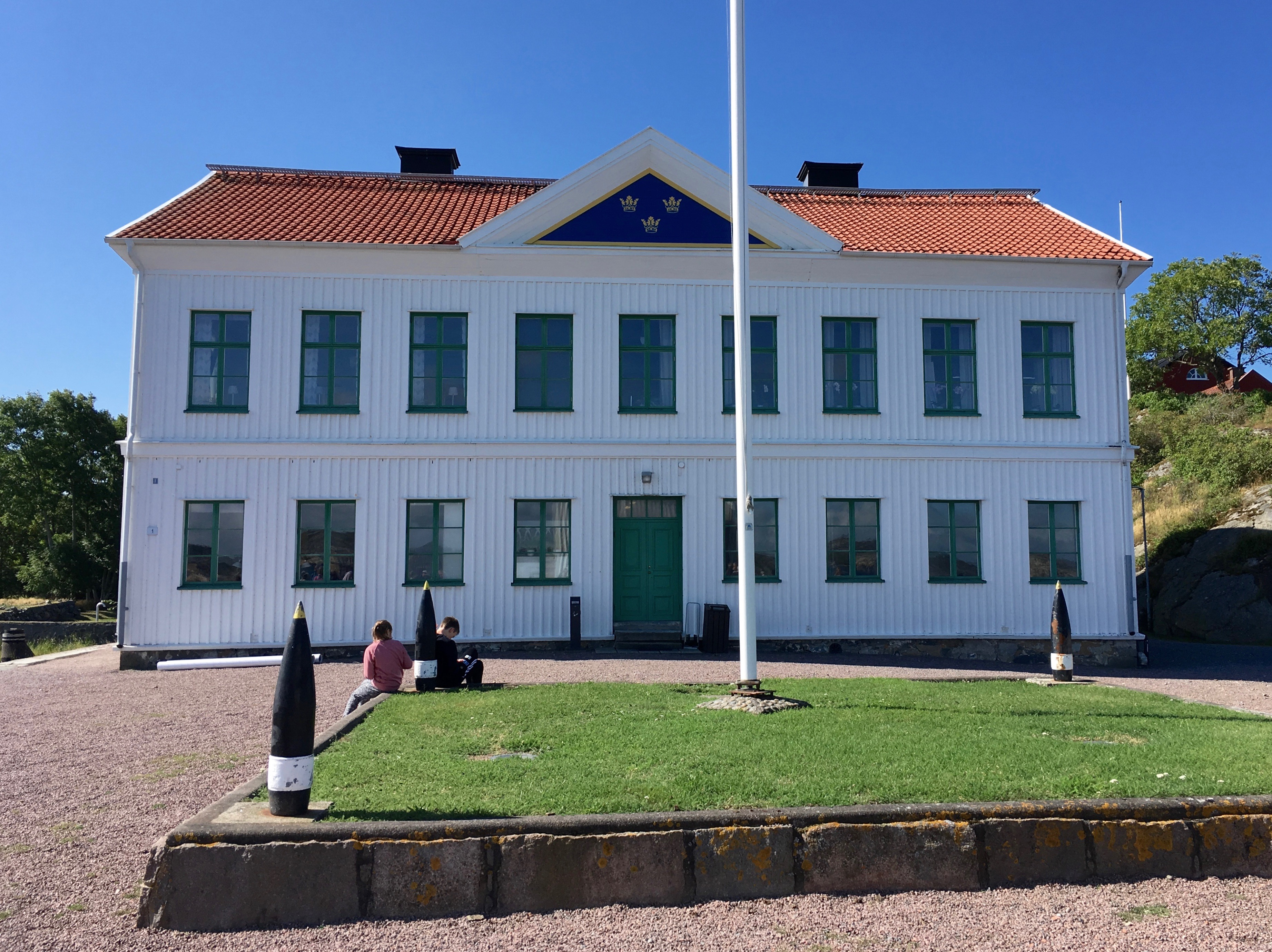 Kanslihuset är en byggnad på den tidigare Känsö karantänsanläggning på Känsö utanför Göteborg.